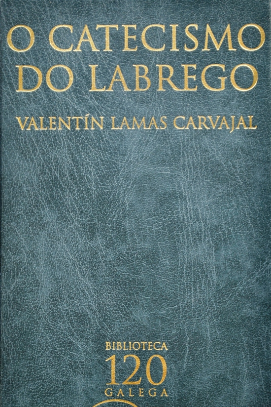 Detalle da portada dun volume de O catecismo do labrego de Valentín Lamas Carvajal, da Biblioteca Galega 120.